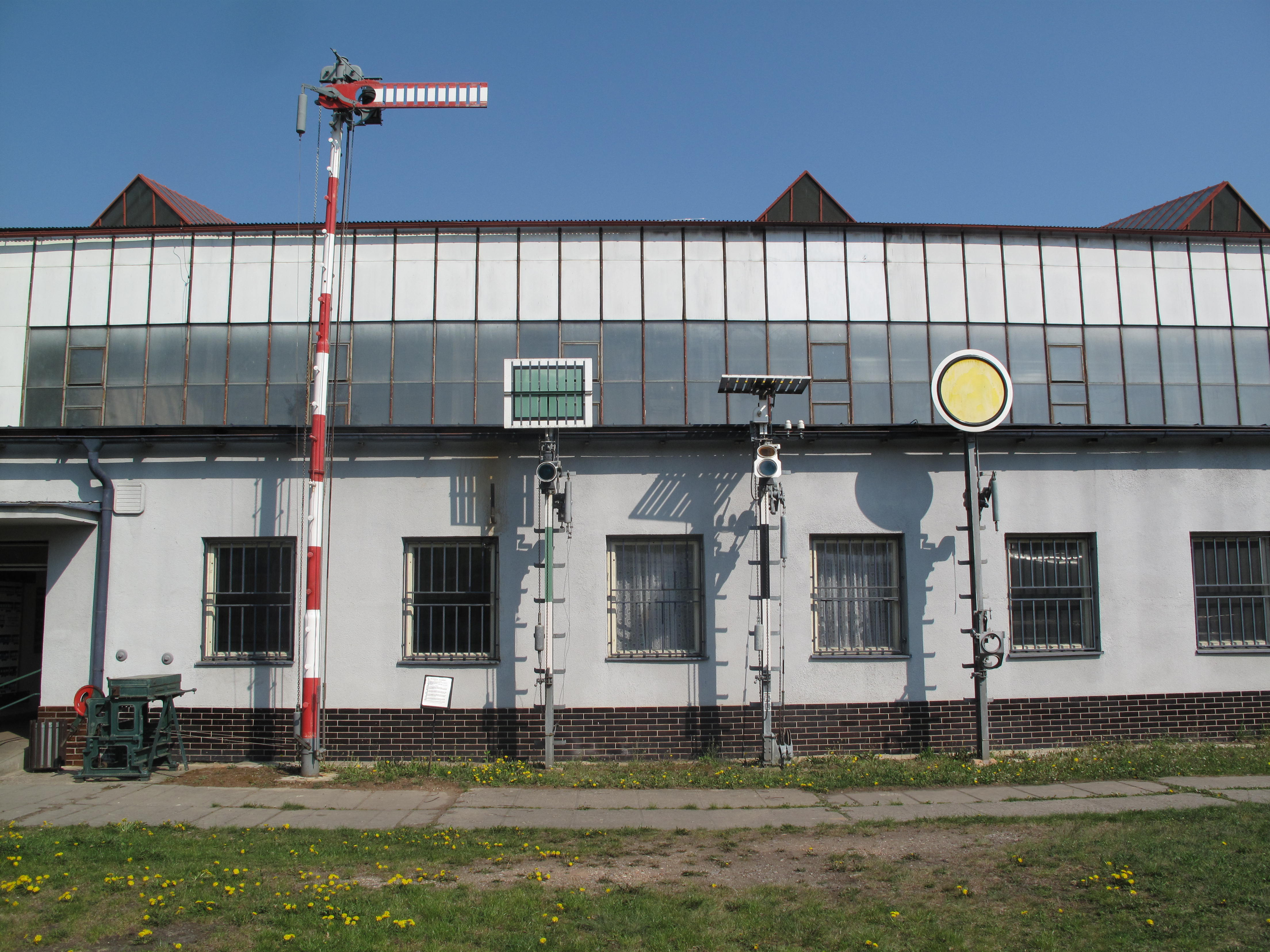 Železniční muzeum Lužná u Rakovníka